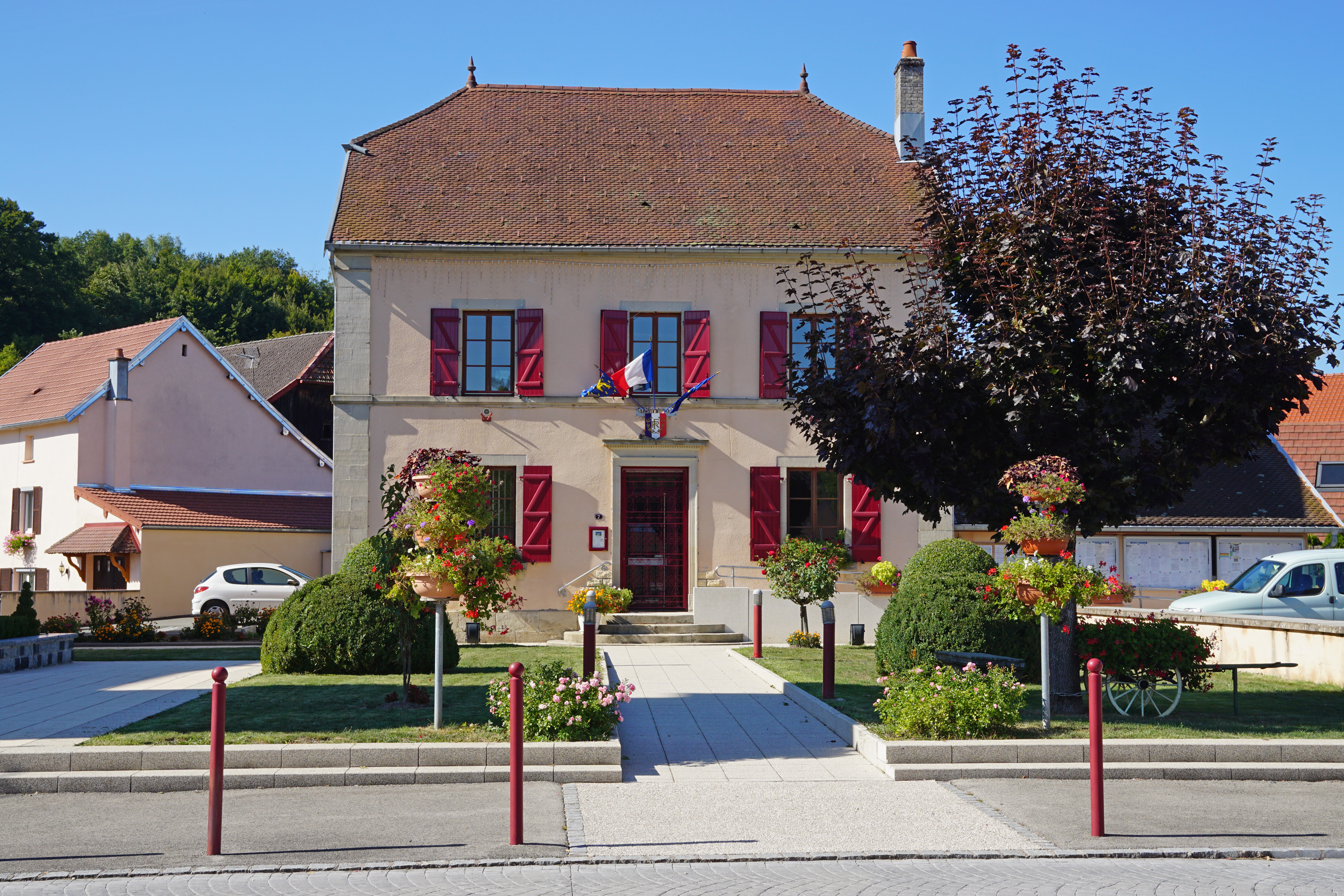 La mairie de Magny-Vernois 70.